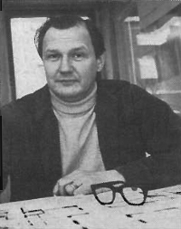 Erik Thelaus